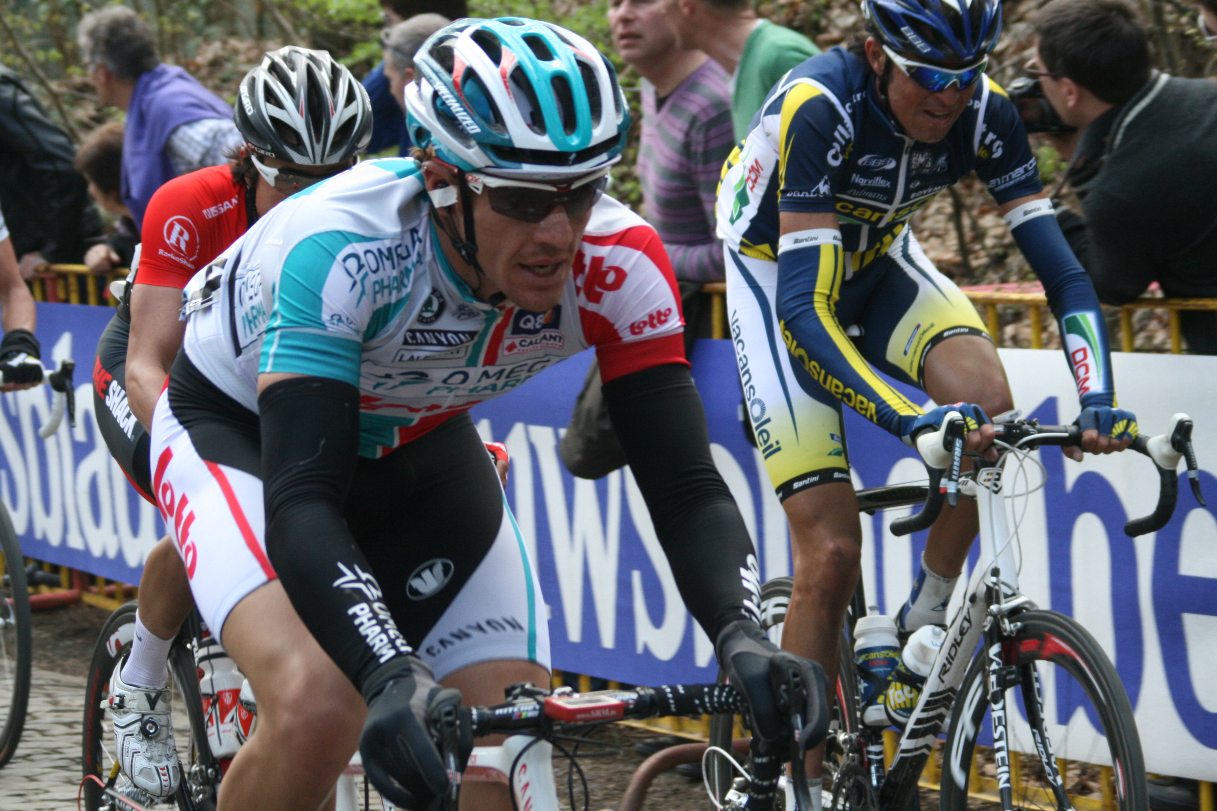 Gent-Wevelgem 2011, Kemmelberg